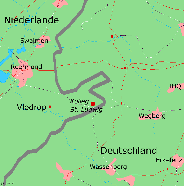 Karte mit der Lage des Kolleg St. Ludwig, Kartenquelle: [1]